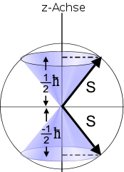 schematische Darstellung: Projektion des Spins eines Spin-1/2-Teilchens auf die z-Achse